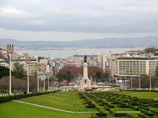 Photographer: Osvaldo Gago